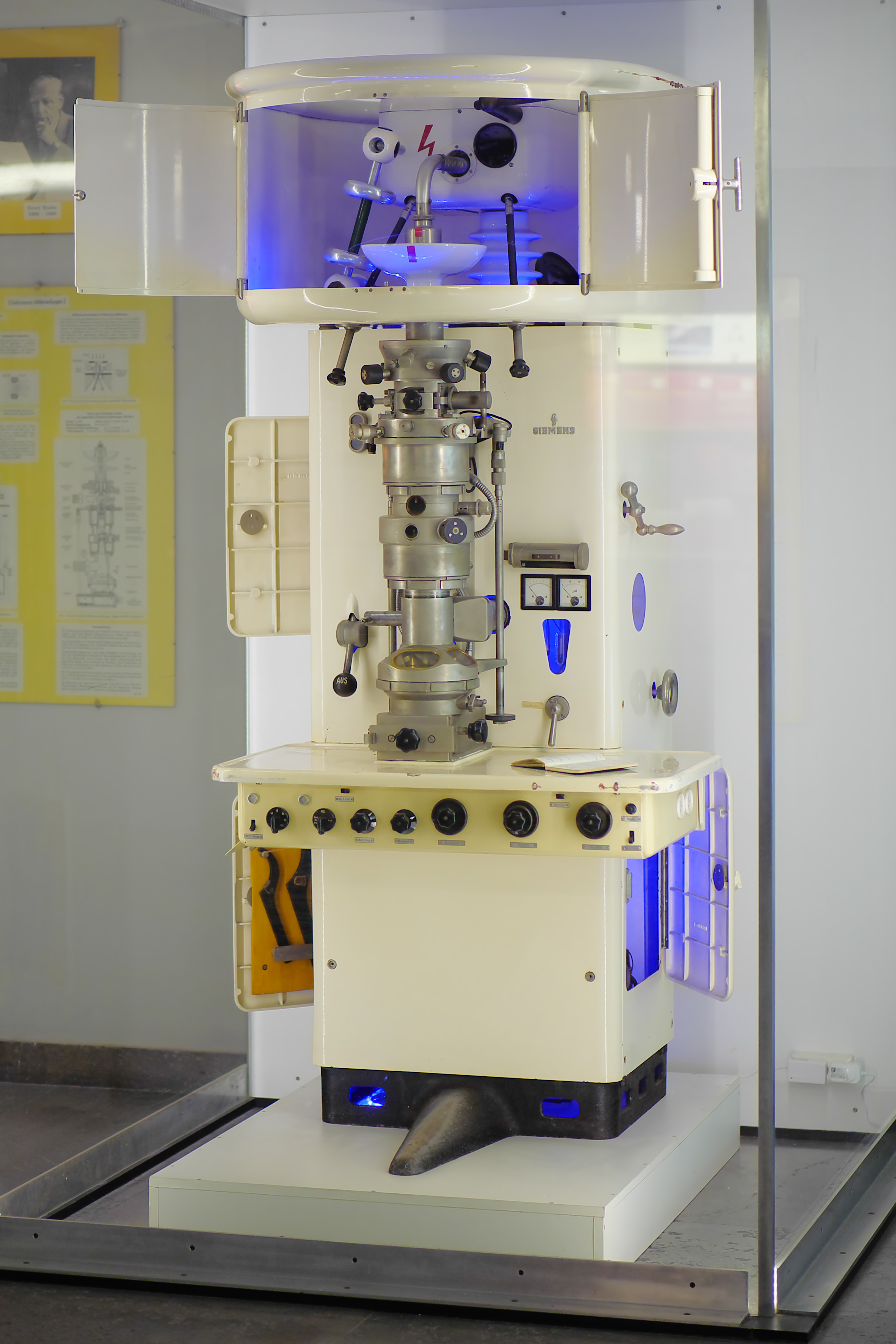 Das Übermikroskop (Transmissionselektronenmikroskop) ÜM100 von Siemens, das seit 1949 von Ernst Ruska gebaut wurde, im Foyer des Ernst-Ruska-Gebäudes der Technischen Universität Berlin.